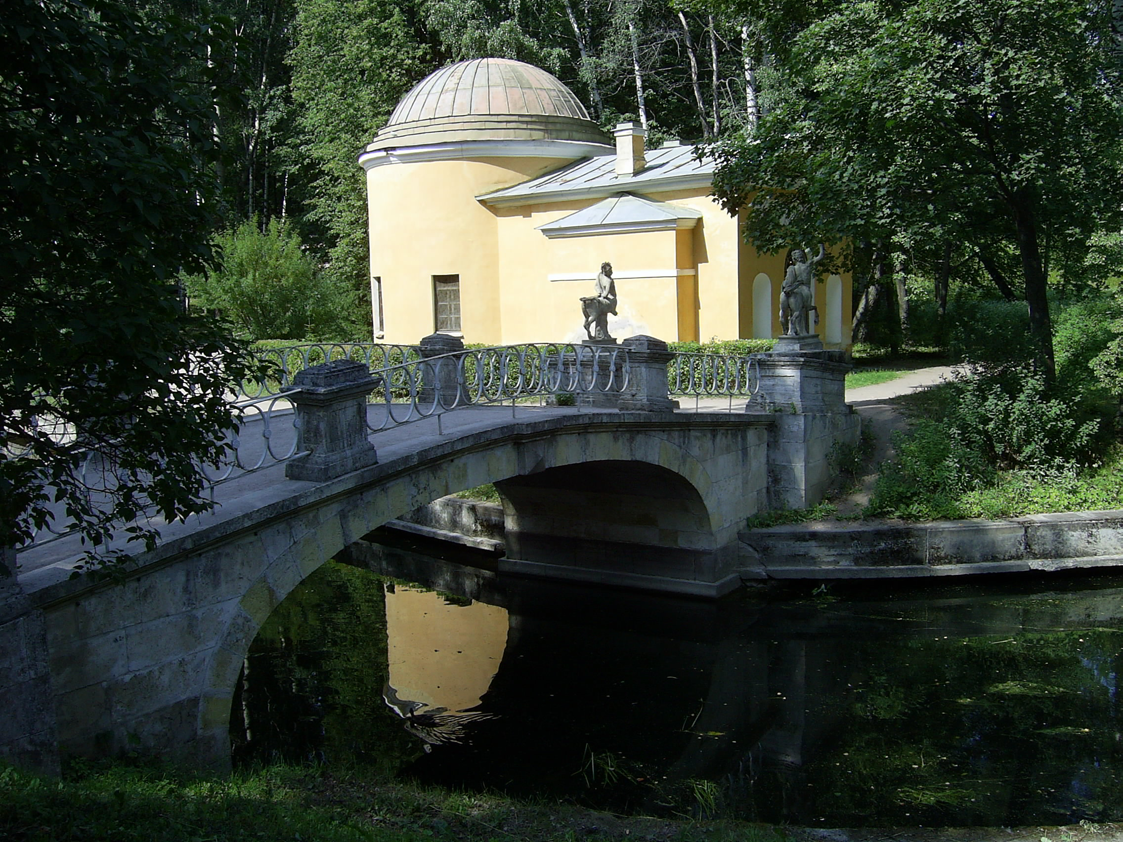 Bridge in Pavlovsk Park